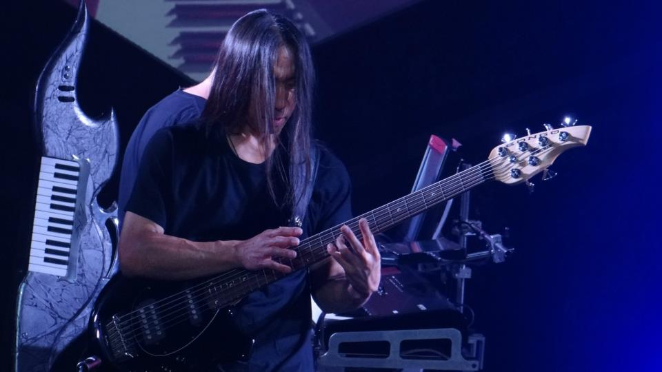 John Myung en un recital de Dream Theater de 2012.